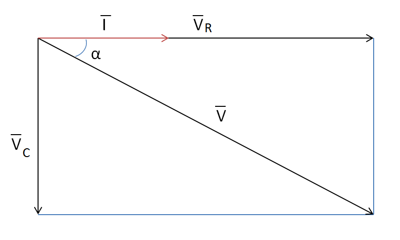 V Vc Vr in un circuito RC a regime sinusolidale